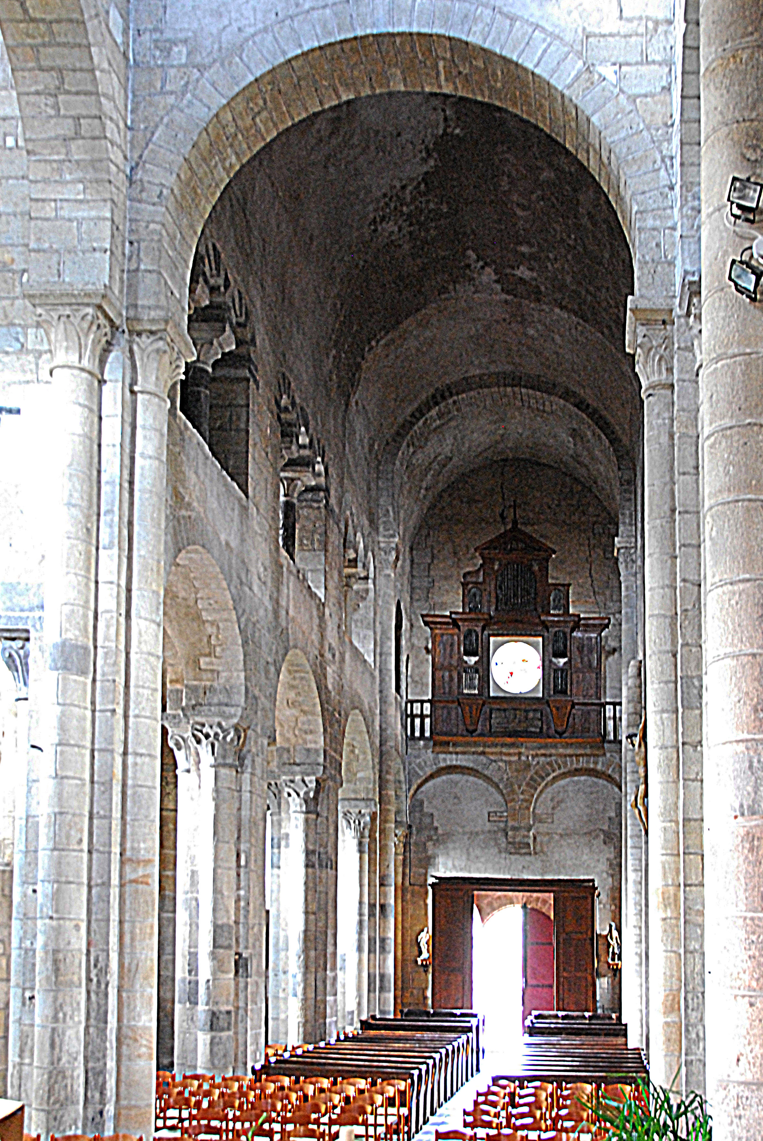 St-Saturnin (Puy-de-Dôme), Mittelschiff aus Vierung